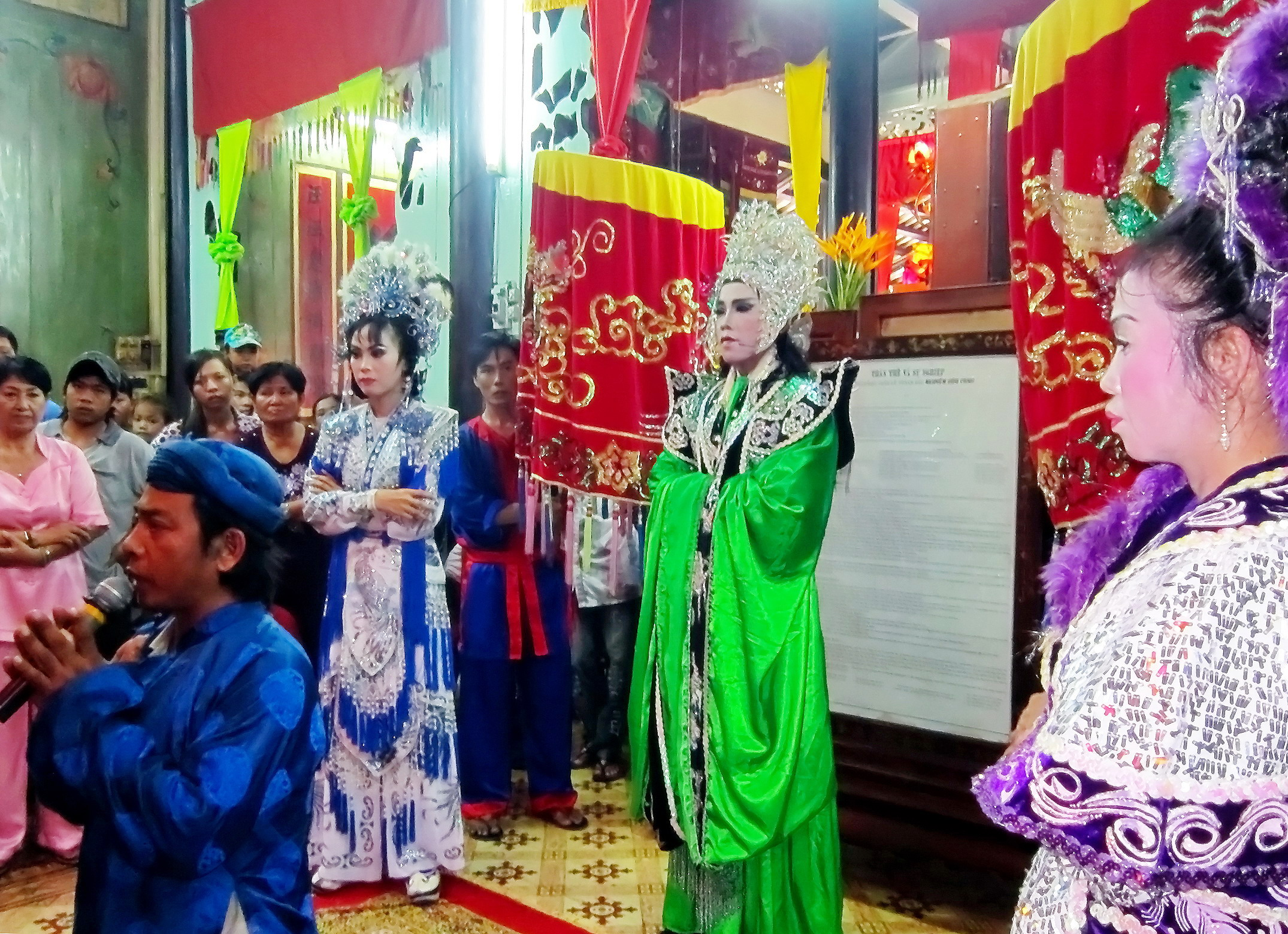 Màn "tôn vương" diễn ra trước bàn thờ thần Thành hoàng trong lễ Kỳ yên tại đình Mỹ Phước (An Giang, Việt Nam) vào giữa trưa ngày 9 tháng 6 năm 2014.